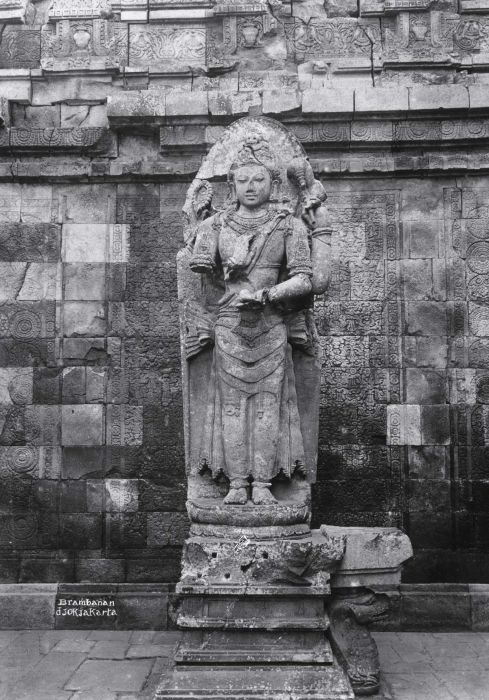 Foto. Mahadewa in de Lara Djonggrang hindoe-tempel te Prambanan